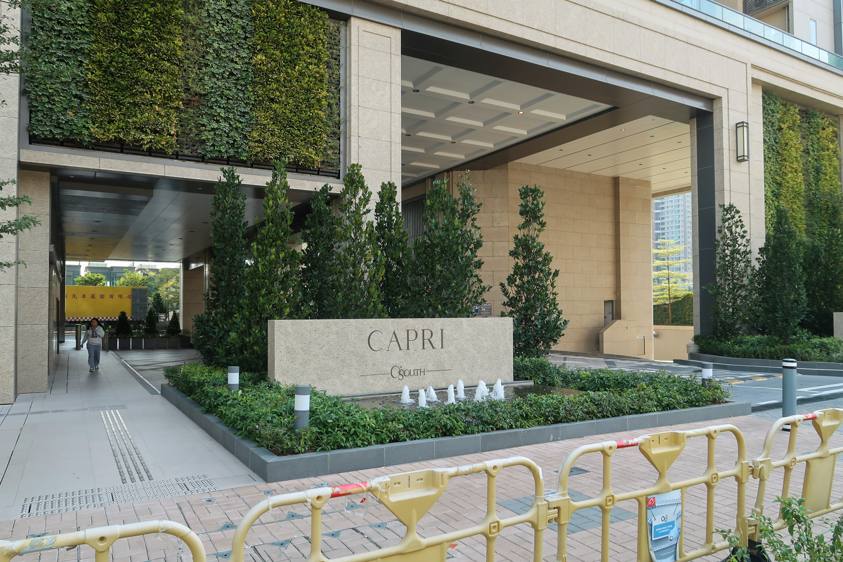 CAPRI Car Entrance